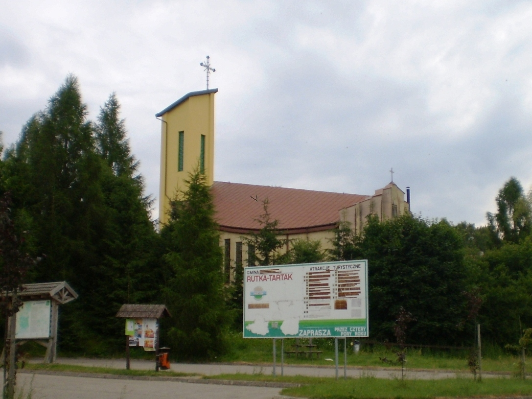 Rutka Tartako bažnyčia, Rutka Tartako raj., Lenkija